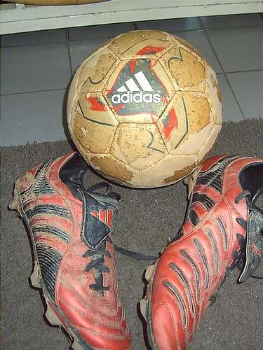 Adidas - Predator Pulsado & Fevernova Glider MS